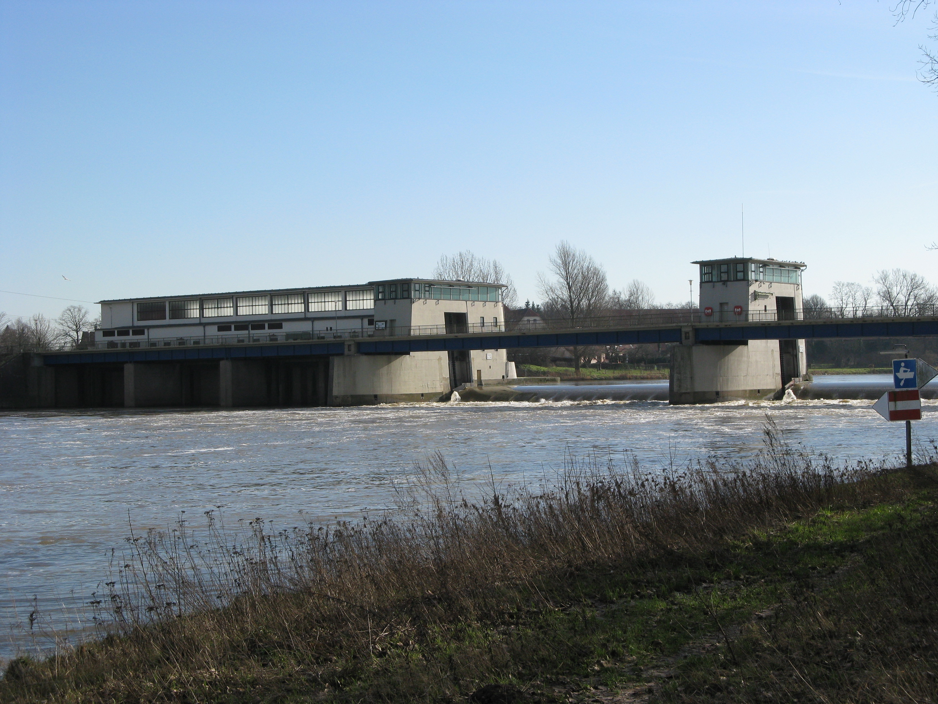 Staustufe Schlüsselburg, Wehranlage (rechts) und Wasserkraftwerk (links); Weser im Vordergrund im Naturschutzgebiet „Weseraue“ (NSG MI-002), hinter der Staufstufe NSG MI-014 „Staustufe Schlüsselburg“